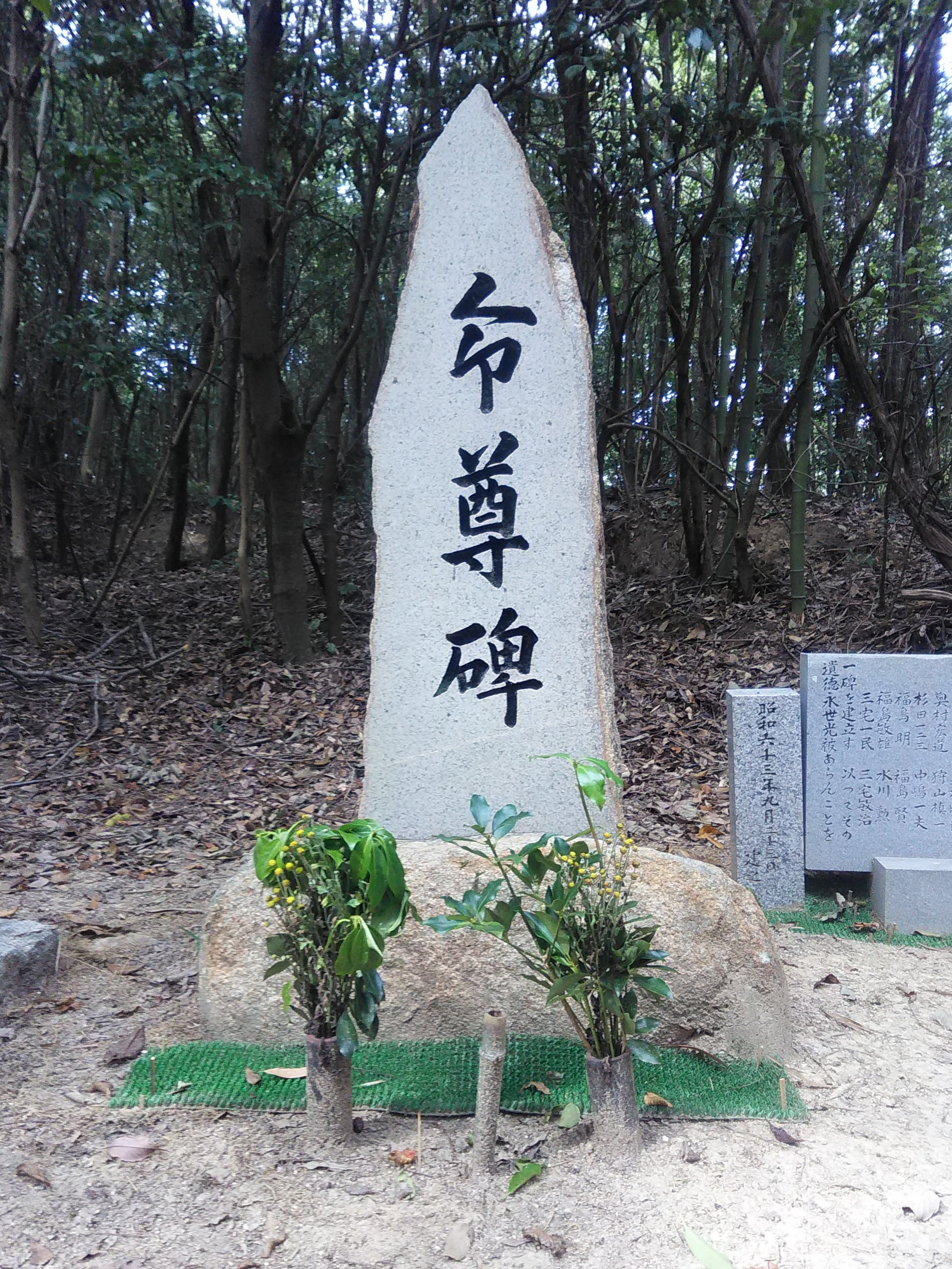 岡田更生館事件の犠牲者を悼む石碑